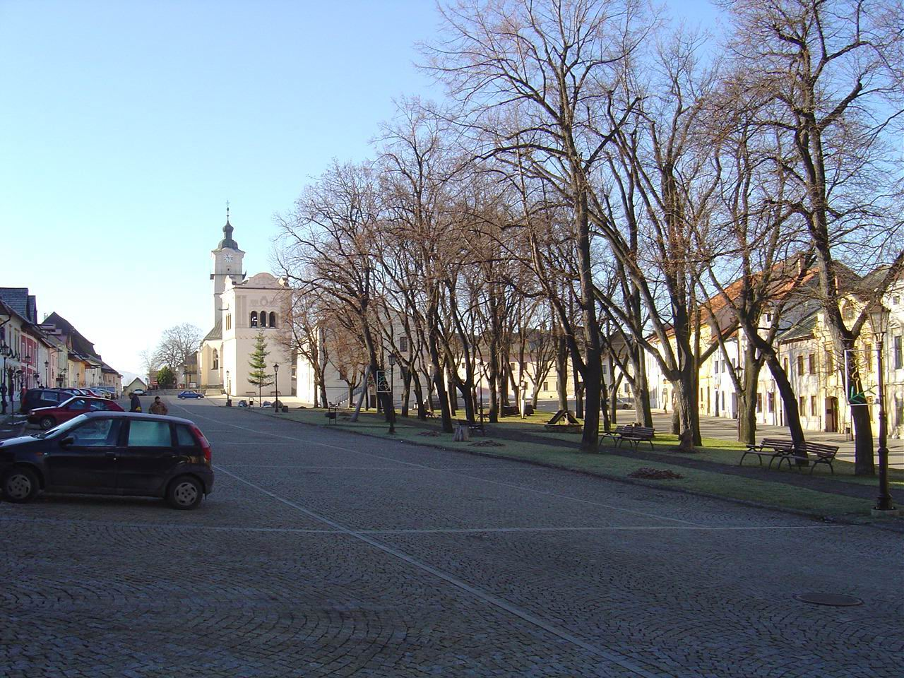 Spišská Sobota square